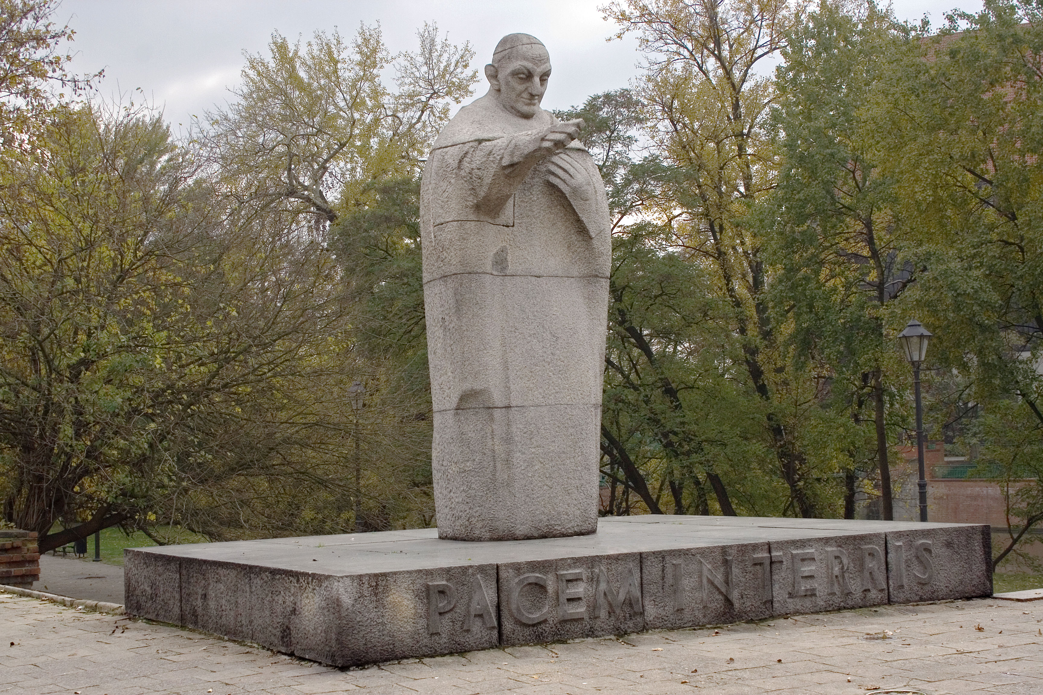 Pomnik Papieża Jana XXIII